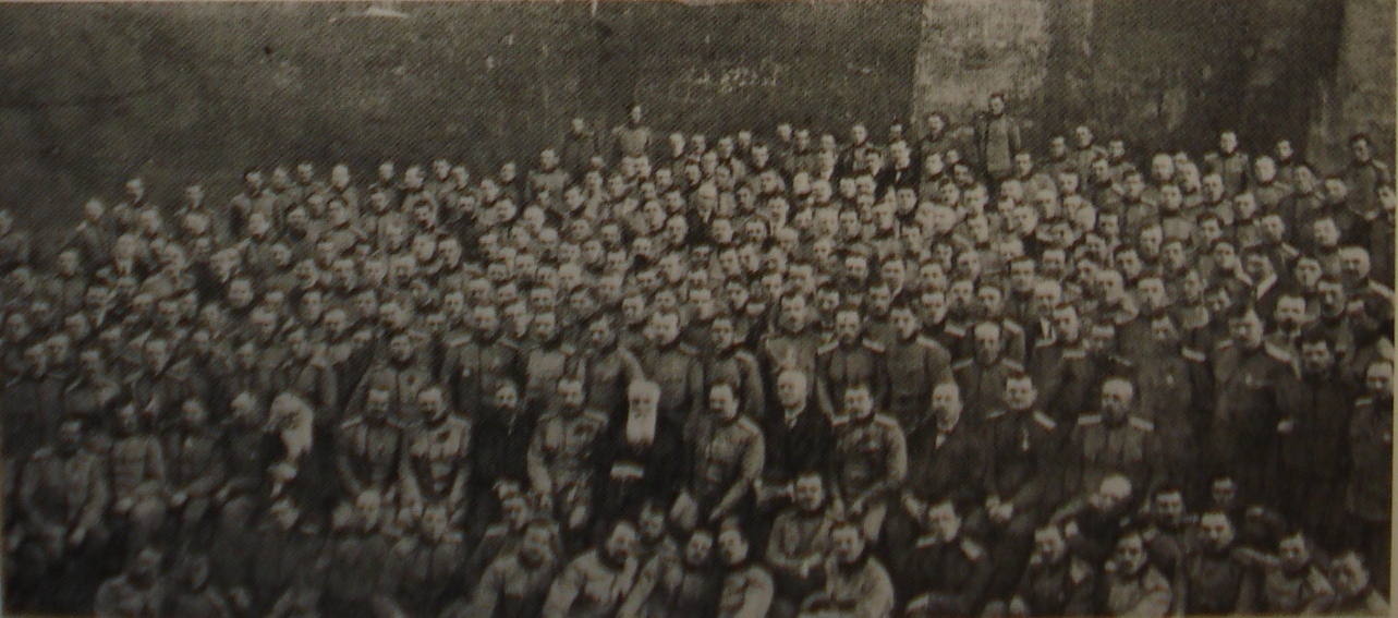 Časnici dobrovoljačkog korpusa Slovenaca, Hrvata i Srba u Odessi 1916. prilikom Pašićeva posjeta